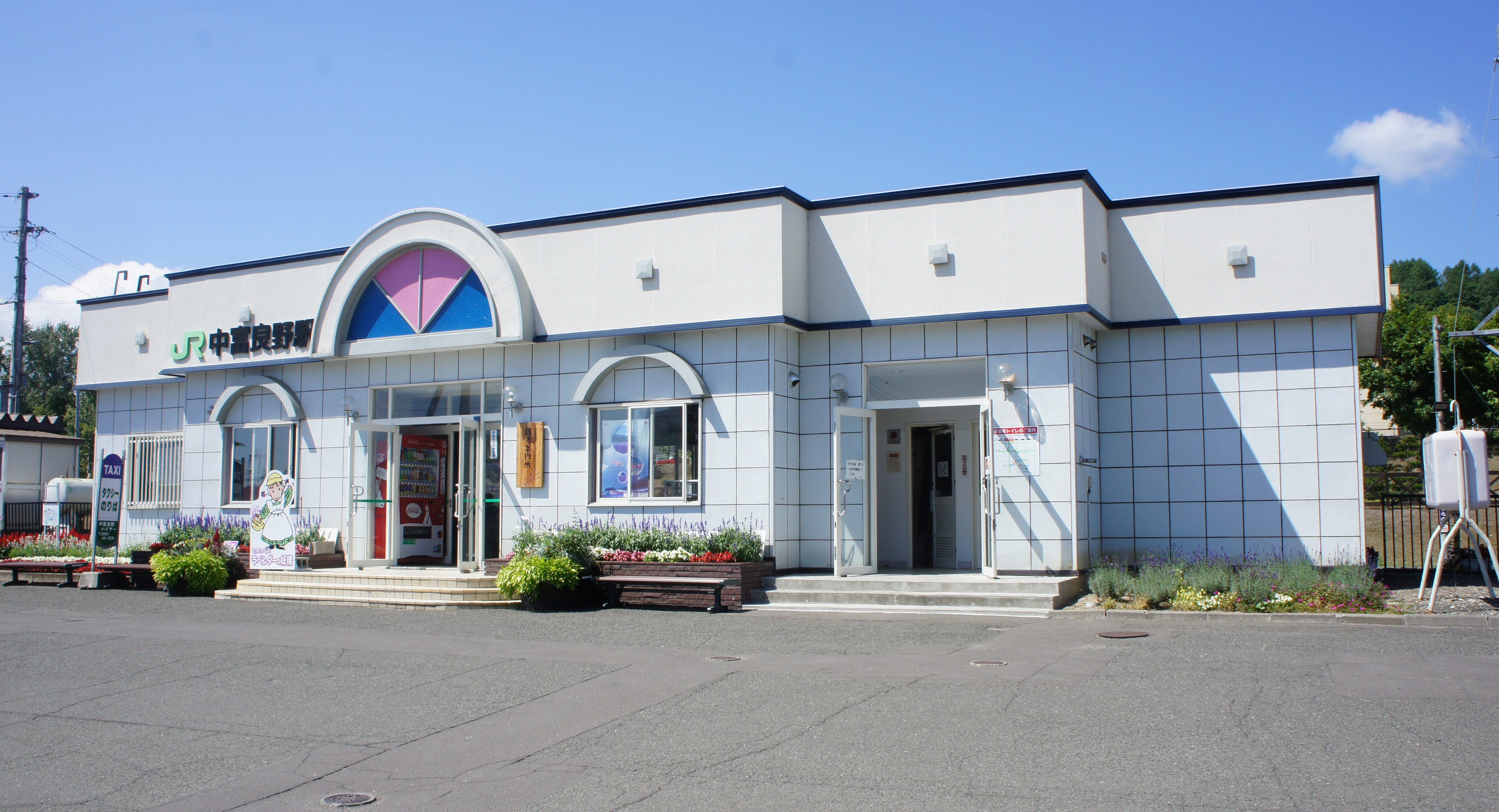 JR富良野線・中富良野駅の駅舎